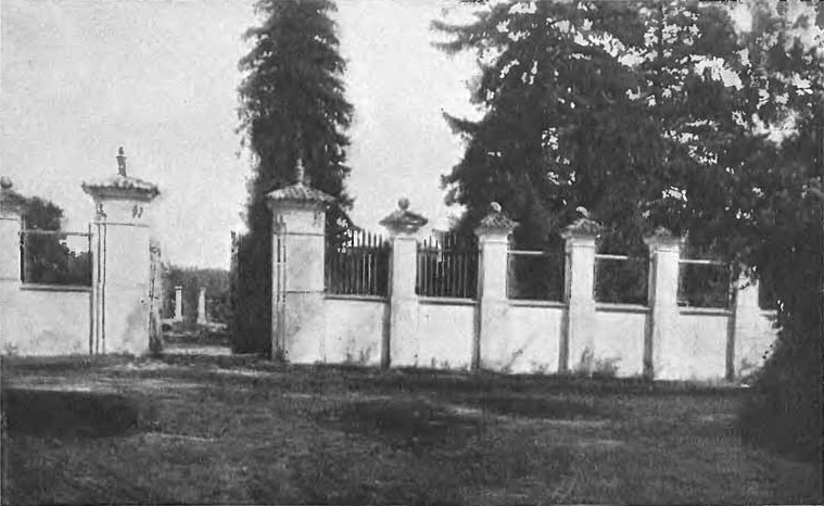 Беларуская (тарашкевіца): Мажэйкаў Вялікі (Mažejkaŭ Vialiki), сядзіба Хадкевічаў (Chadkievič), зьнішчаная пажарам